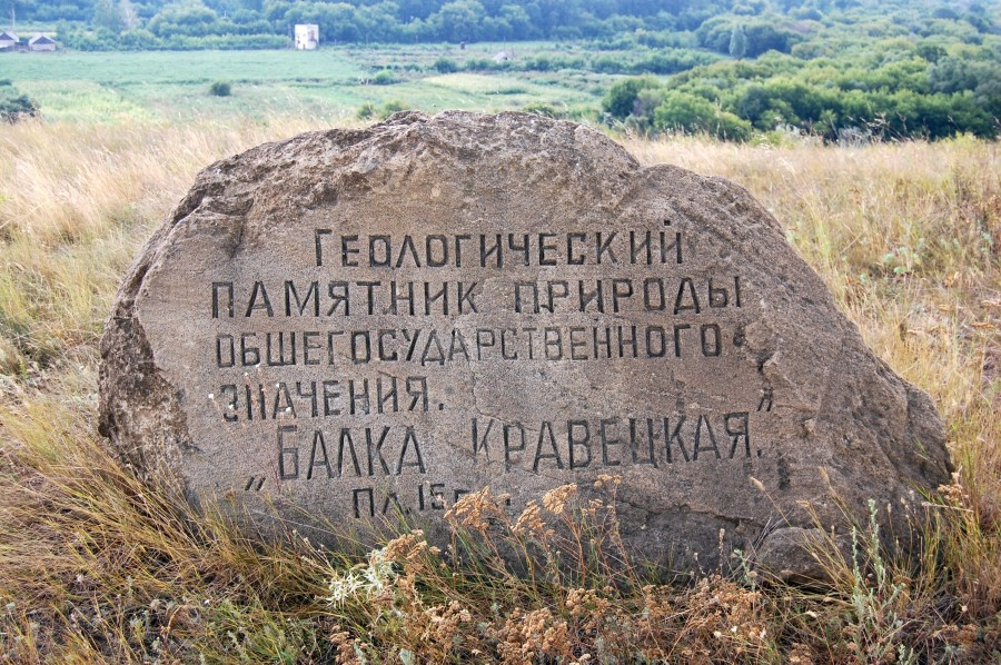 Балка Кравецька. Монументальна плитка